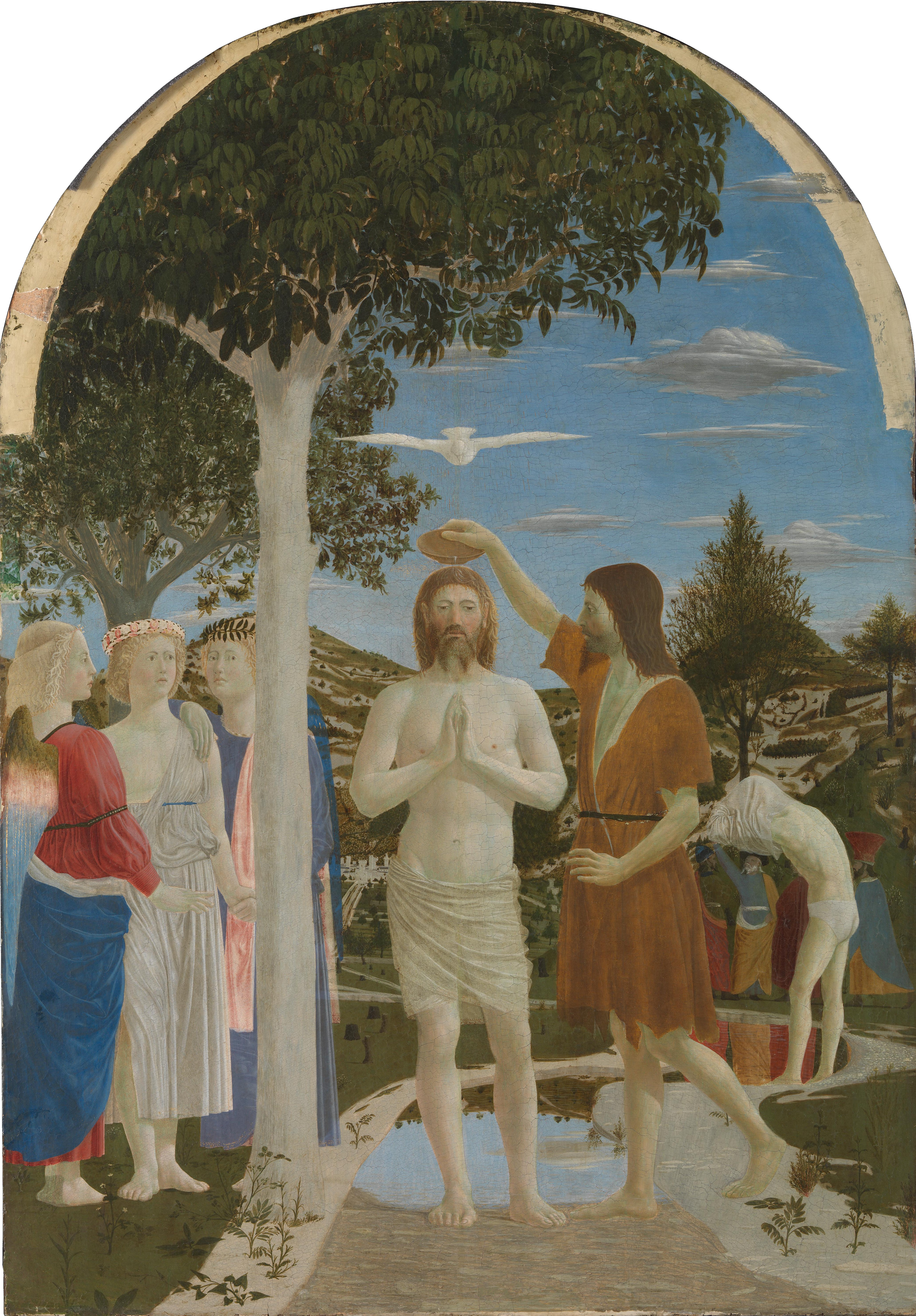 Christus wird von Johannes dem Täufer im Jordan getauft.